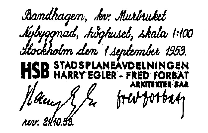 Murbruket 1, ritningsstämpel, höghuset i Bandhagens centrum arkitekt Fred Forbat